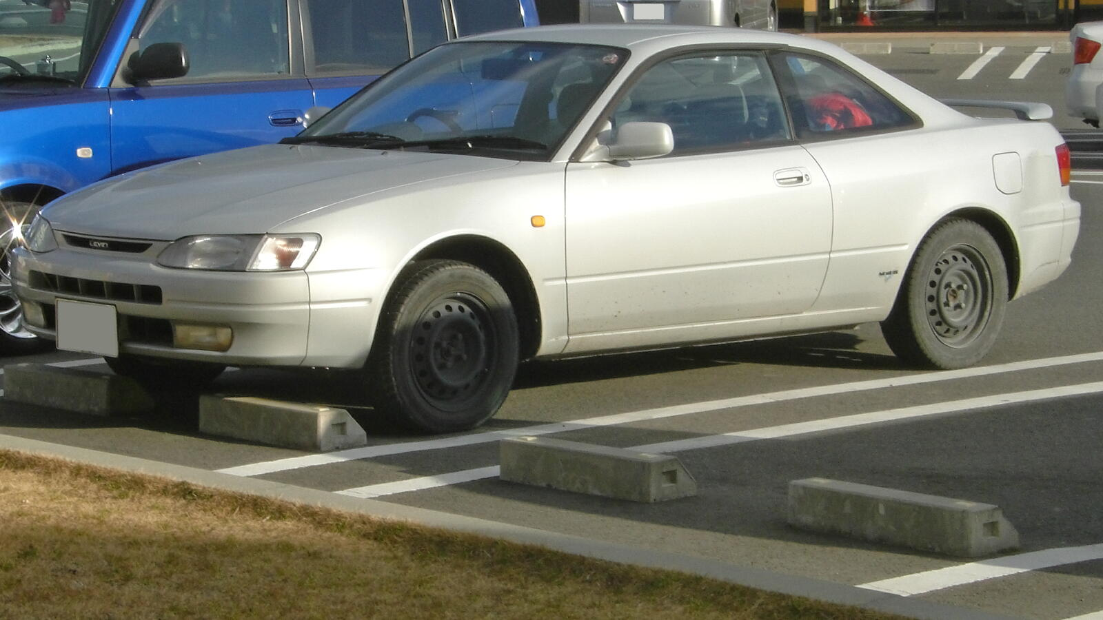 トヨタ・カローラレビン（AE110系）